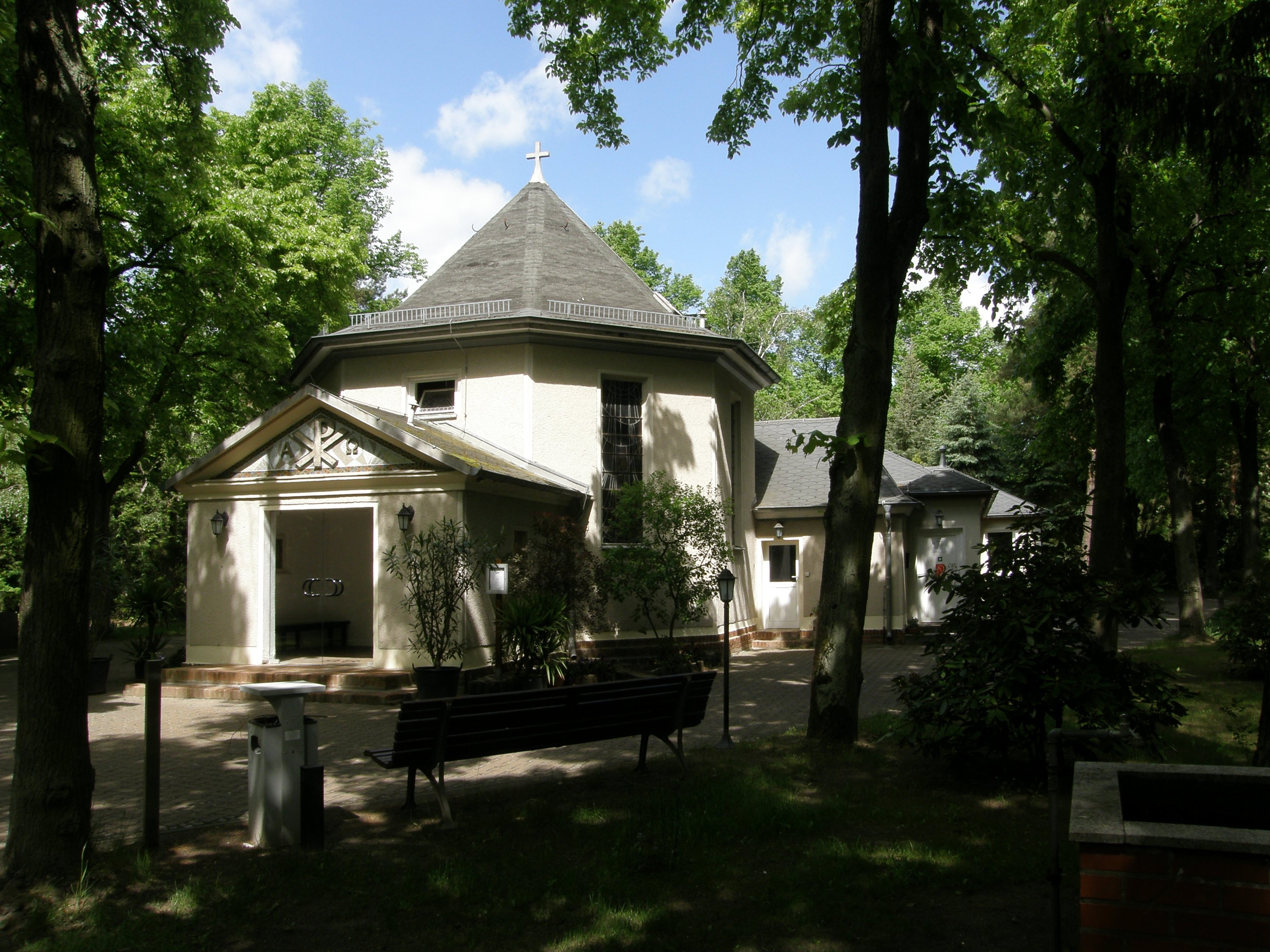 Berlin-Mahlsdorf; Rahnsdorfer Straße, Waldfriedhof, Kapelle